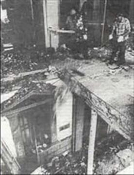 Estado en que quedó el juzgado de Les Borges Blanques tras el atentado de Terra Lliure el 10/09/1987